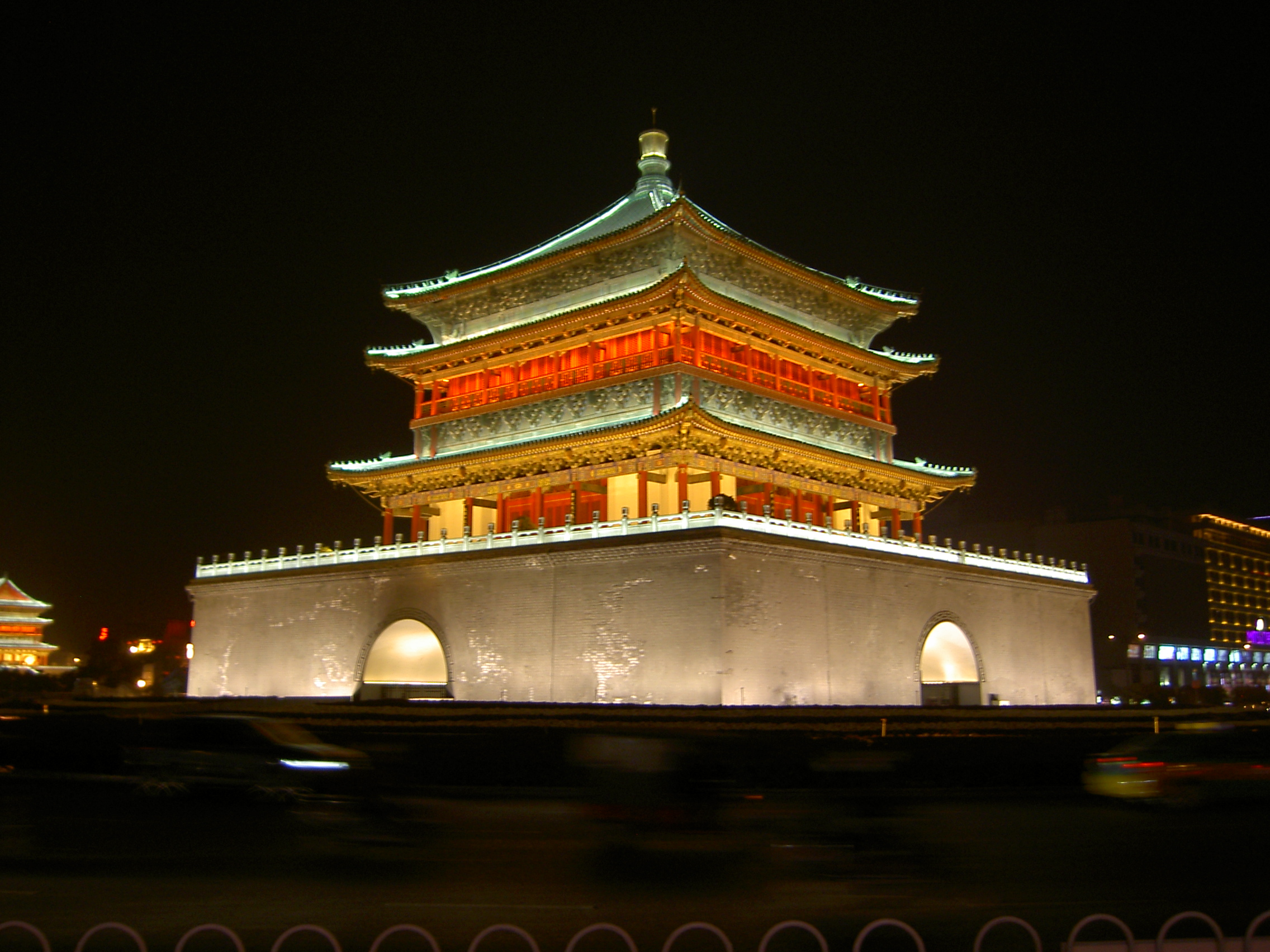 Glockenturm in Xi'an, China bei Nacht